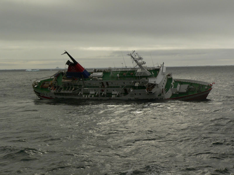 Untergang der MS Explorer und Rettungsaktion der MS Nordnorge am 23.11.2007 im Bransfield Strait